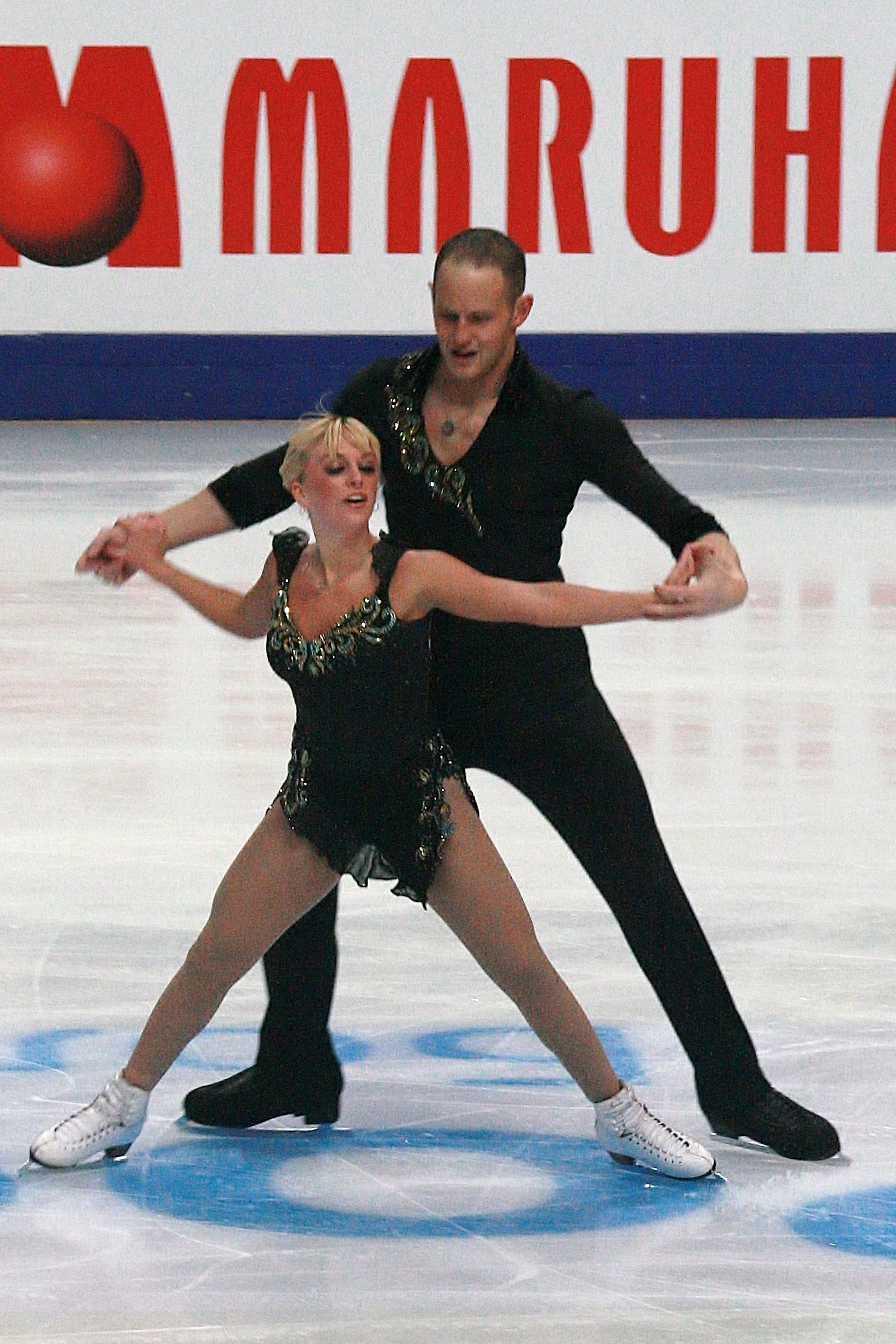 Кейди Денни и Джон Кафлин (США) на Кубке Ростелекома 2012. Короткая программа.